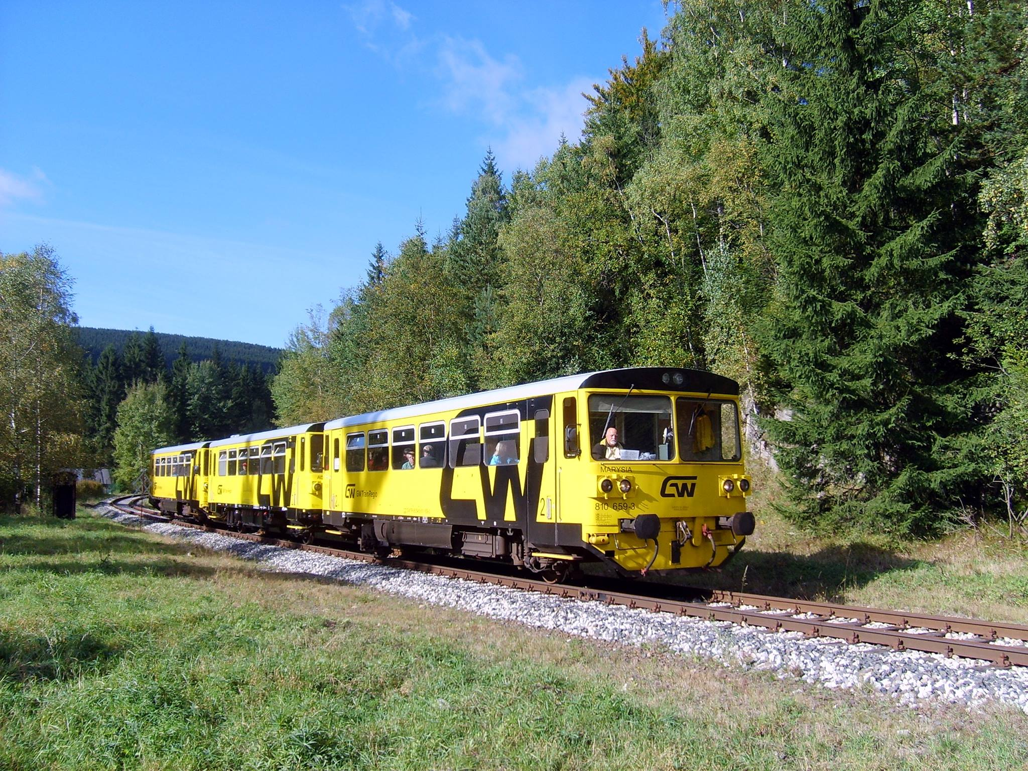 Pociąg GWTR rel. Korenov - Szklarska Poręba Górna (w Polsce uruchamiany w kooperacji ze spółką Przewozy Regionalne) nieopodal przystanku Szklarska Poręba Huta.